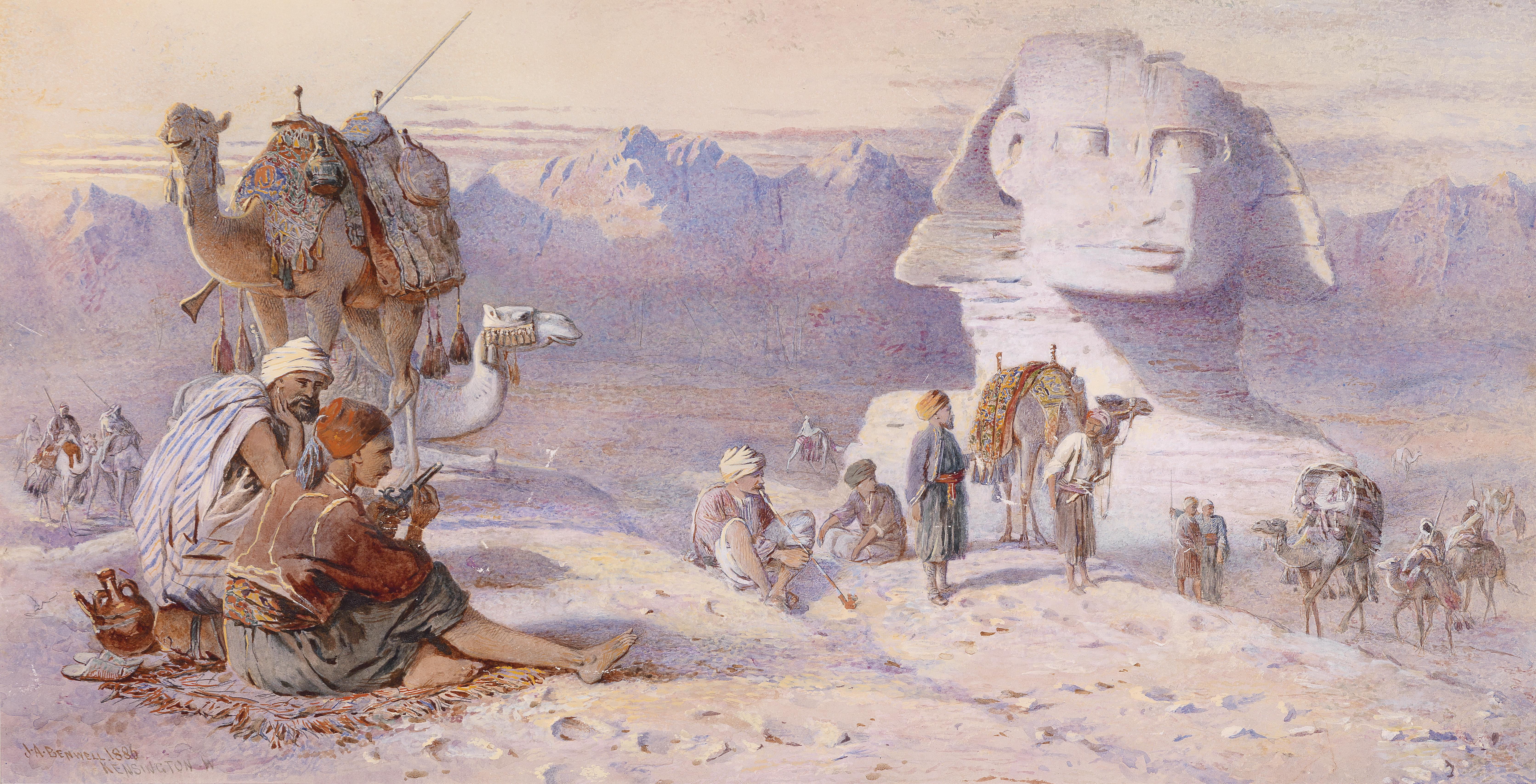 Rastende bei der großen Sphinx von Gizeh, signiert und datiert J. A. Benwell 1886, Kensington W., Aquarell auf Papier, 33 x 65 cm